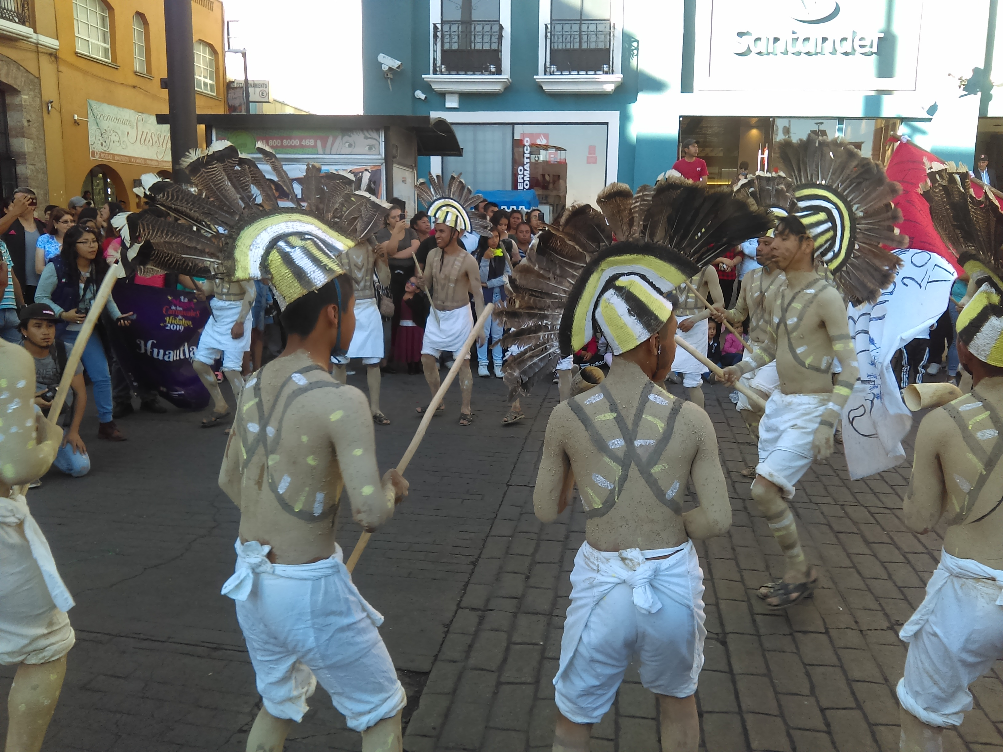 Previo a los festejos del carnaval, desde 2013 en el mes de febrero, se realiza el desfile “Magia de los Carnavales de Hidalgo en Pachuca”. Donde distintos municipios de Hidalgo hacen demostración de sus respectivos carnavales con música y danzas regionales, vestuarios típicos, comparsas y chicoteros. El desfile empieza en avenida Revolución a la altura del Jardín del Arte, sigue por la calle Allende, da vuelta en la Plaza Independencia, luego por las calles Doria y Guerrero, y finaliza en la Plaza Juárez. Entre los municipios que participan se encuentran Acaxochitlán, Alfajayucan, Atotonilco el Grande, Atlapexco, Apan, Calnali, Chapulhuacan, Eloxochitlán, Huautla, Huehuetla, Huejutla de Reyes, Jacala de Ledezma, Jaltocán, Metepec, Metztitlán, Mixquiahuala de Juárez, Molango de Escamilla, San Agustín Metzquititlán, San Bartolo Tutotepec, San Felipe Orizatlán, Santiago de Anaya, Tecozautla, Tepeapulco, Tenango de Doria, Tulancingo de Bravo, Tlahuelilpan, y Zacualtipán de Ángeles.